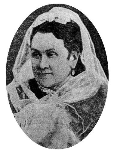 Надежда Андреевна Дондукова-Корсакова, ур. Кологривова (ум. 1884), в первом браке Коновницына.